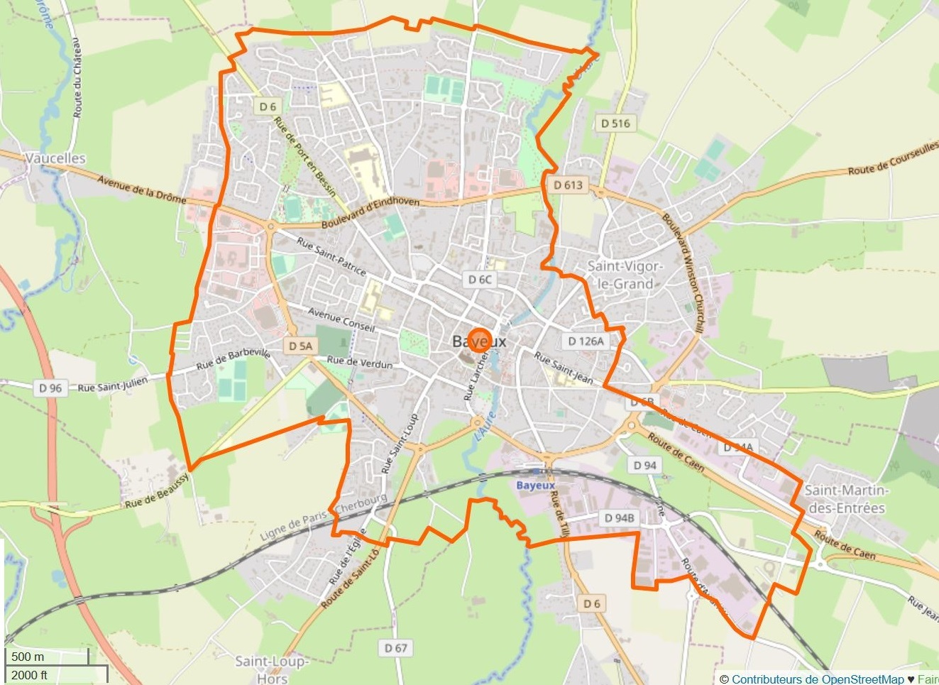 Cette carte a été créée à partir des données du projet Openstreetmap. This map may be incomplete, and may contain errors. Don't rely solely on it for navigation.